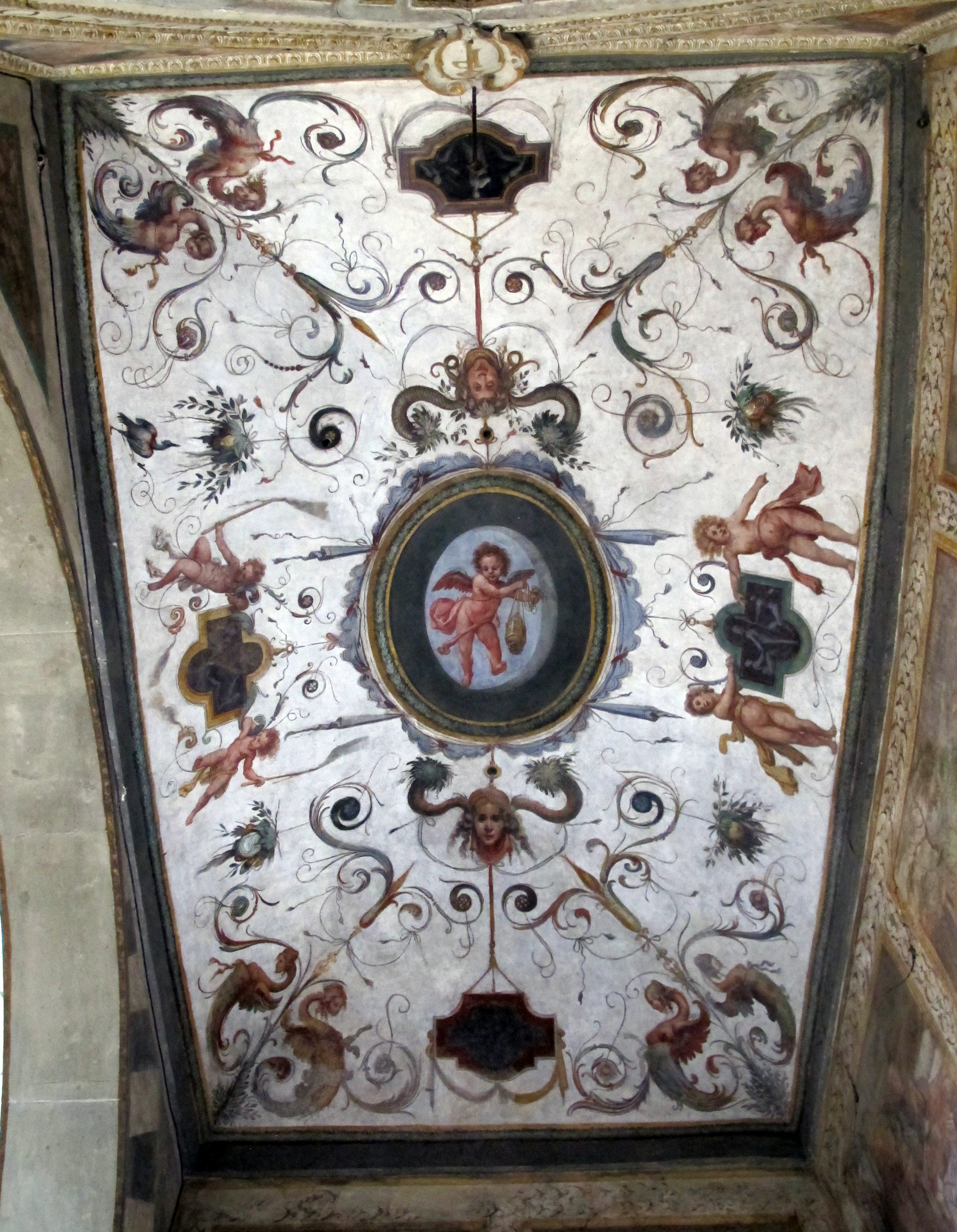 Abbazia di San Michele Arcangelo a Passignano - Cappella di San Giovanni Gualberto